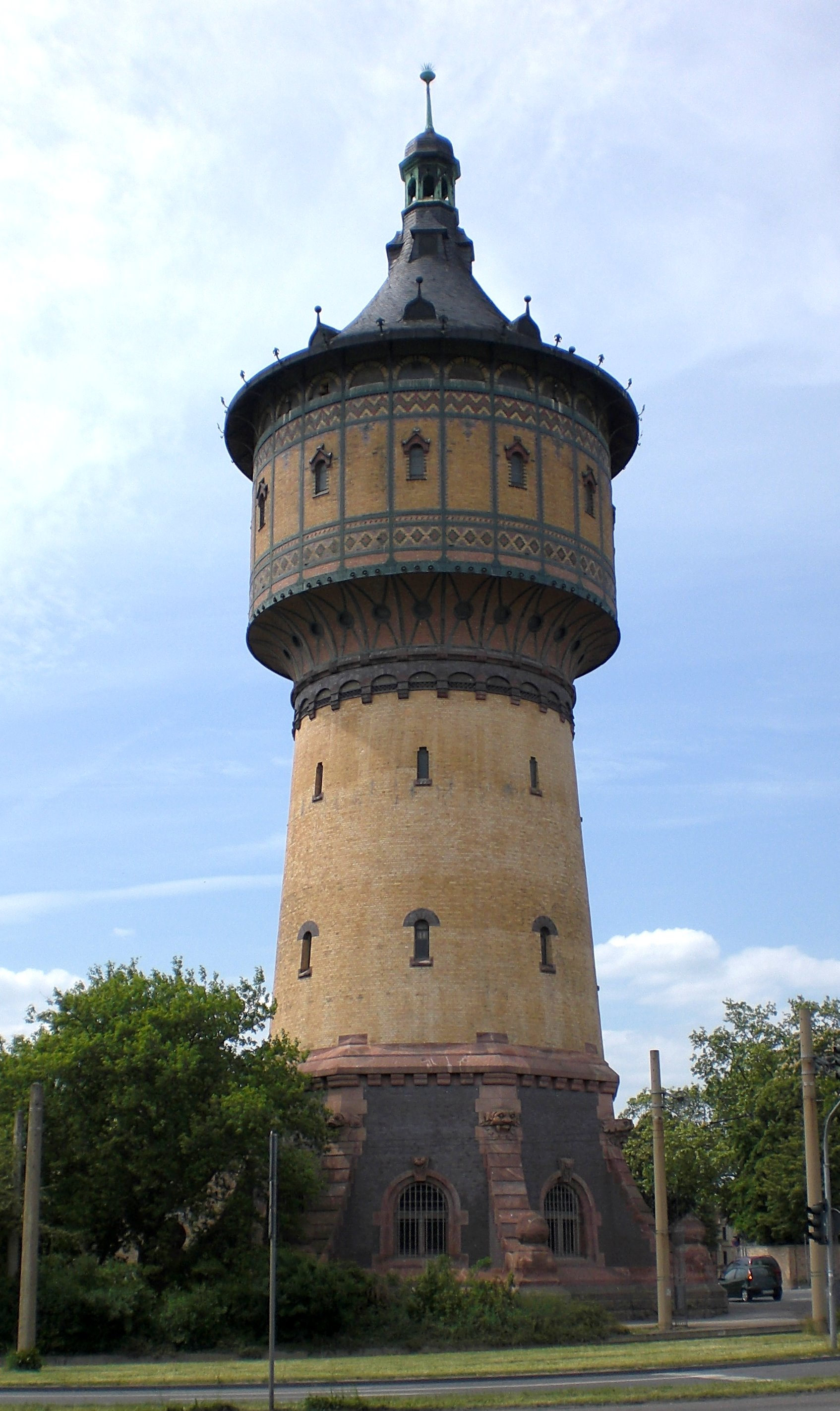 Wasserturm Nord in Halle